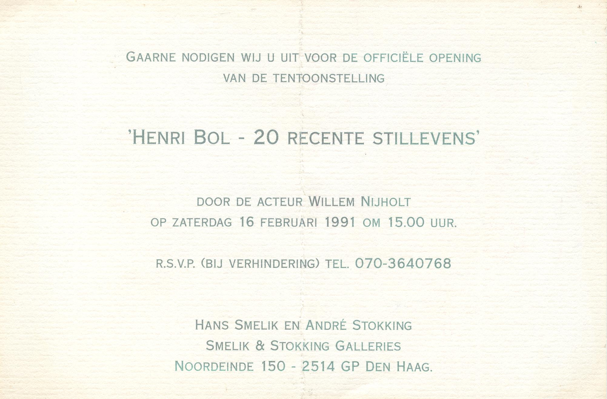 Uitnodiging officiële opening tentoonstelling Henri Bol door acteur Willem Nijholt, d.d. zaterdag 16 februari 1991, Smelik en Stokking Den Haag